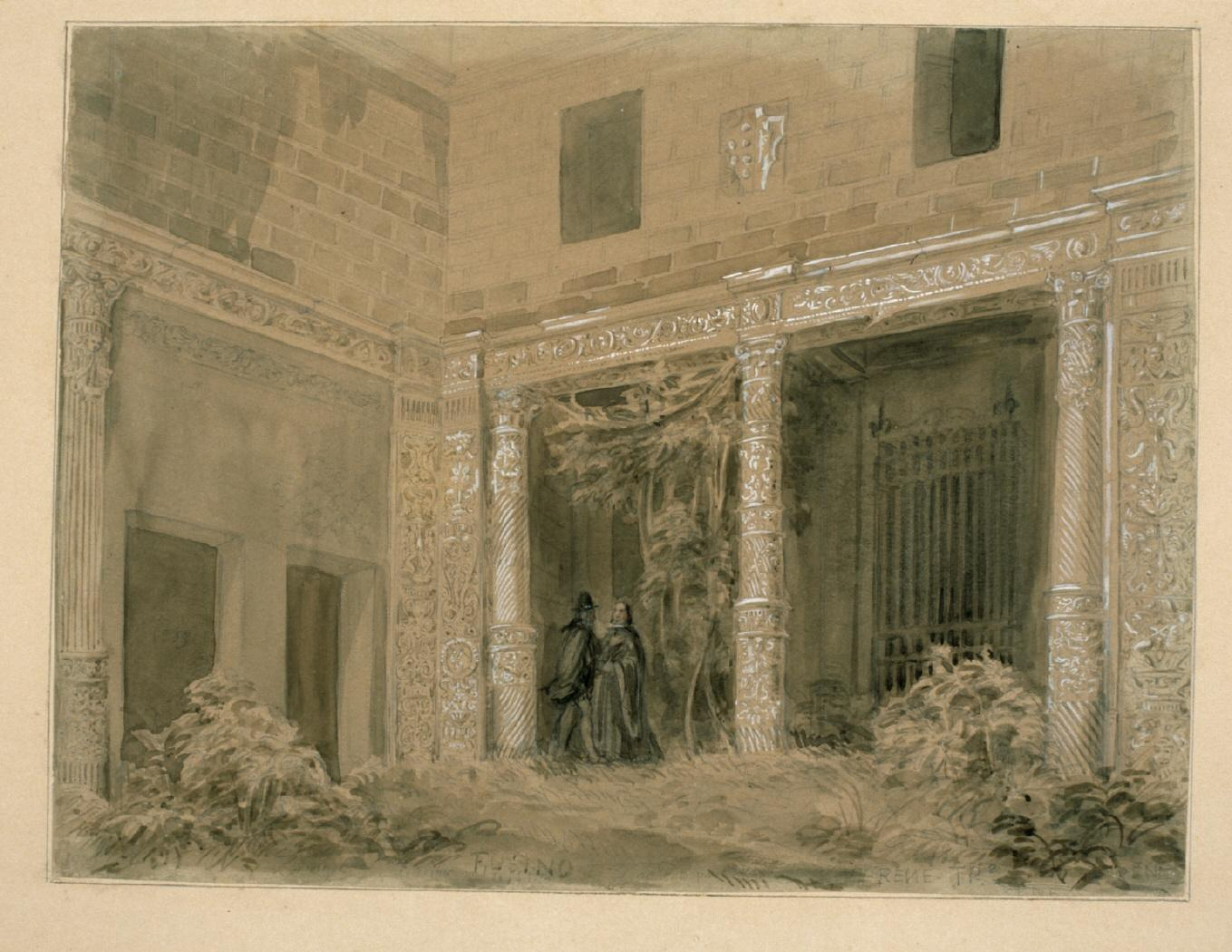 Patio de la antigua casa de hospedaje de los diputados de Aragón, Zaragoza